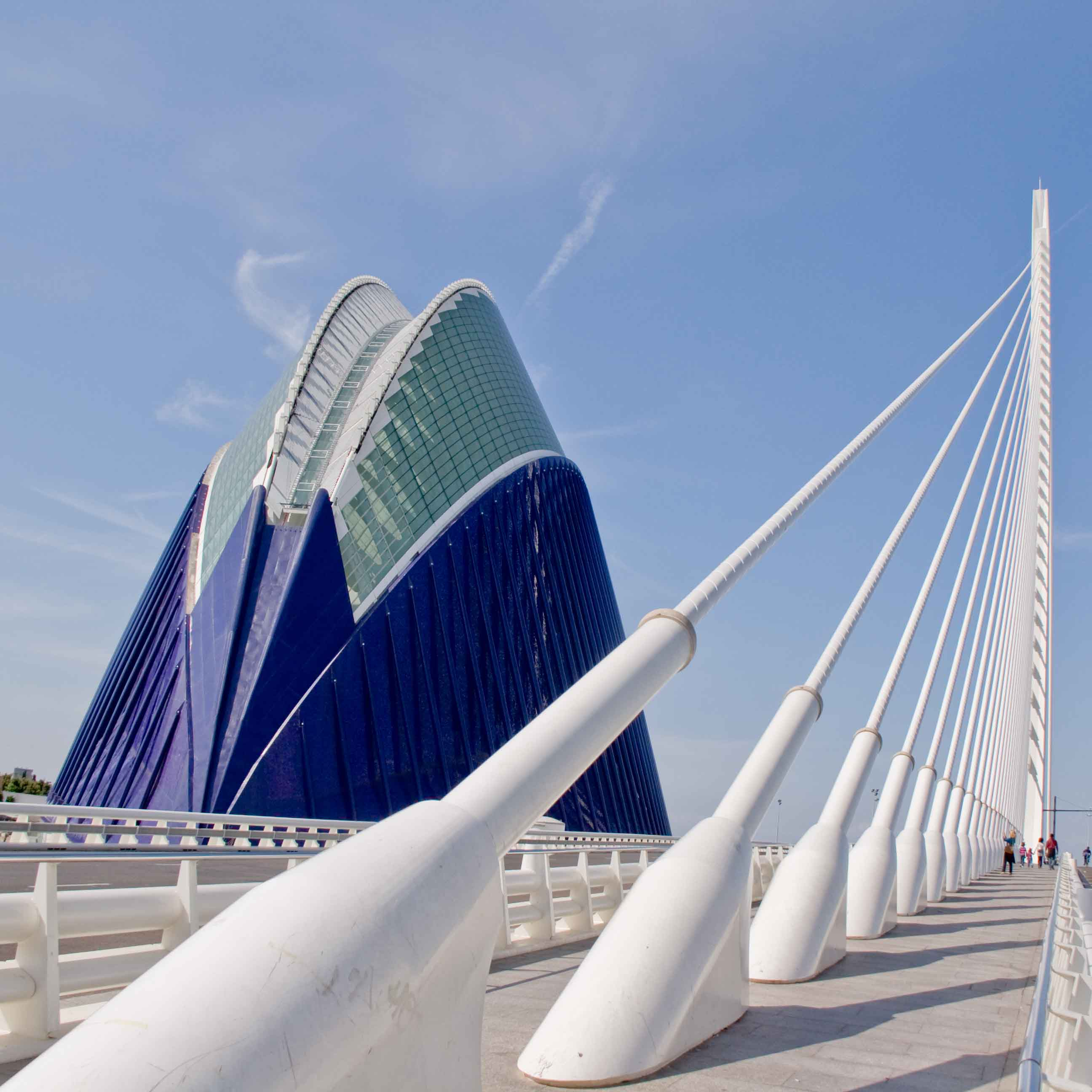 Vista del Ágora y puente de l'Assut de l'Or.